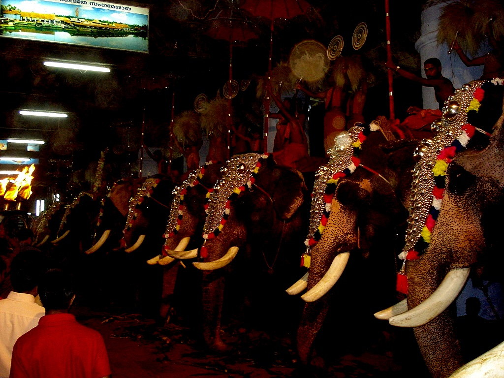 വിളക്കെഴുന്നള്ളത്ത്.